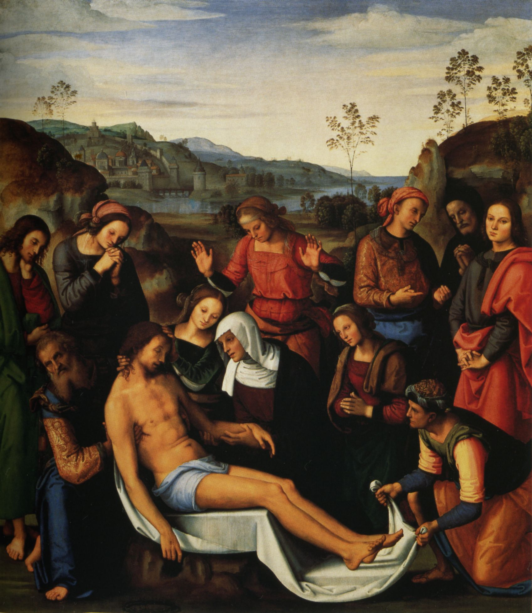 Pietro Perugino: Compianto sul Cristo morto. Cat. no. 40 in Vittoria Garibaldi: Perugino. Catalogo completo. Octavo, Firenze 2000, ISBN 88-8030-091-1